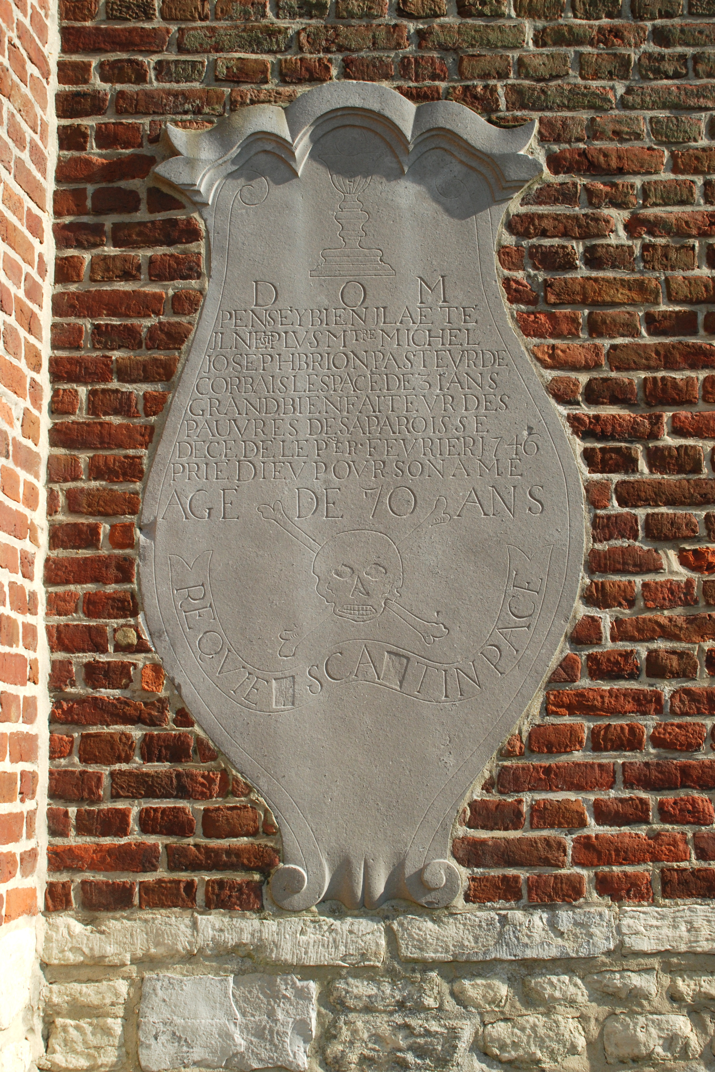 Belgique - Brabant wallon - Mont-Saint-Guibert - Église Saint-Pierre de Corbais - Dalle funéraire du curé Michel Brion